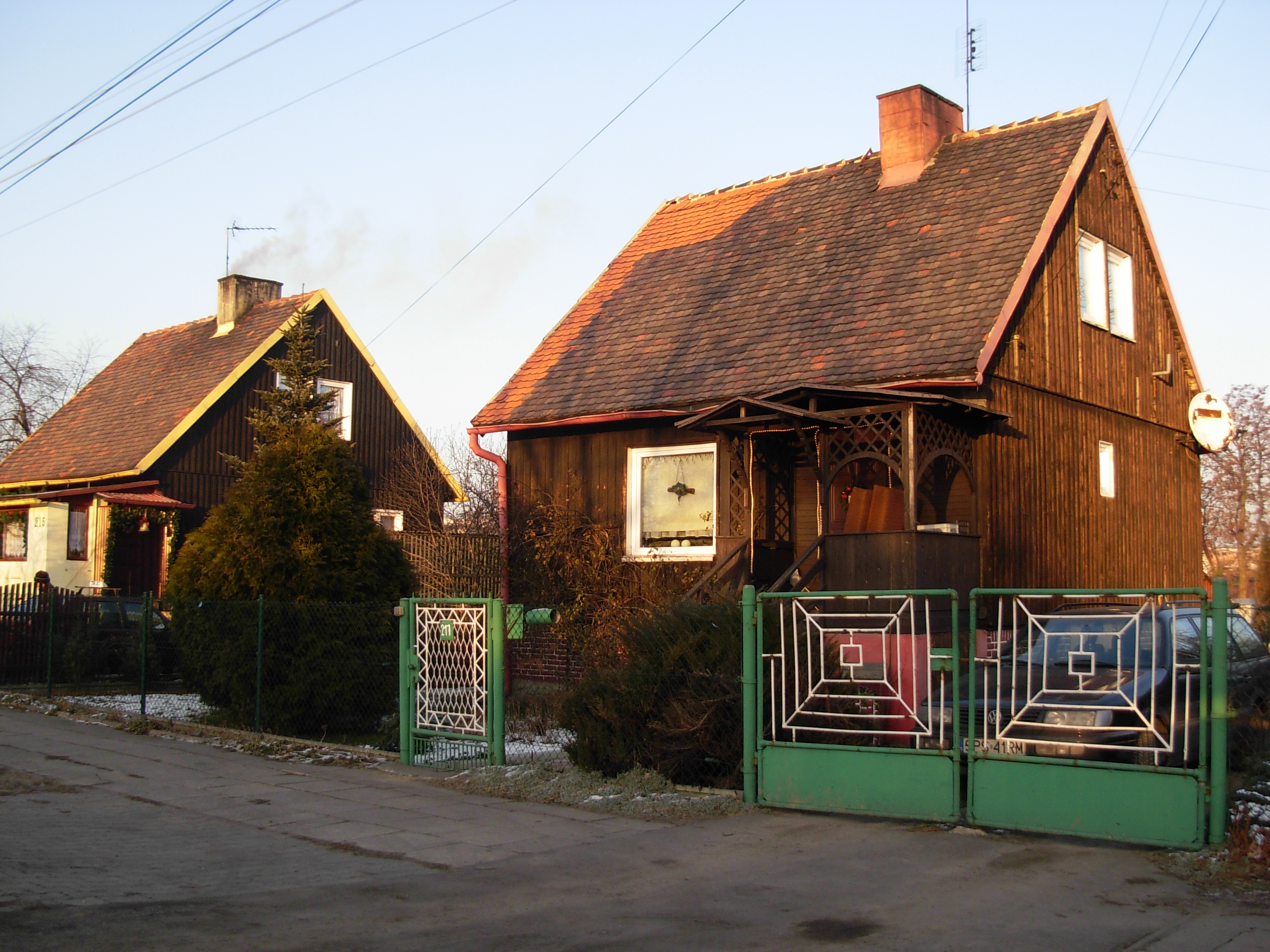 "Domki fińskie", Śląsk.